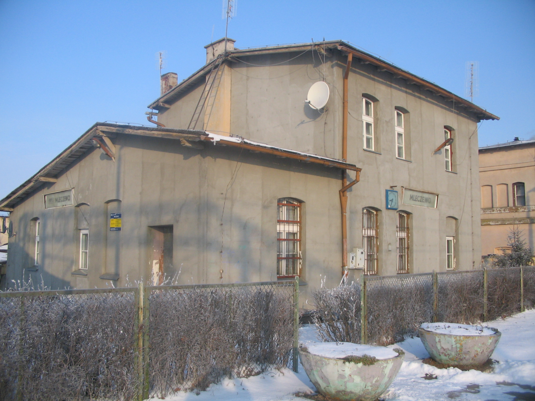 Budynek stacji kolejowej w Mleczewie